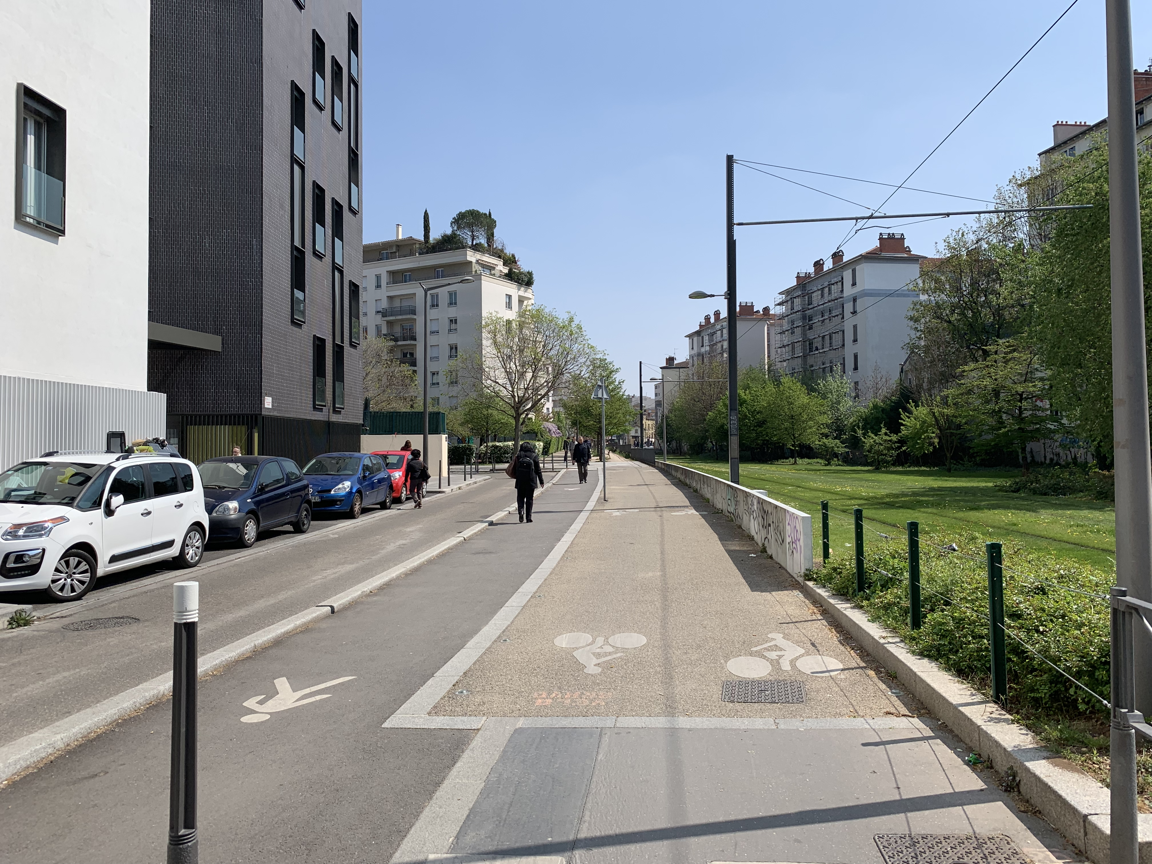 La Rue Jean-Pierre Lévy (Lyon) en avril 2019.